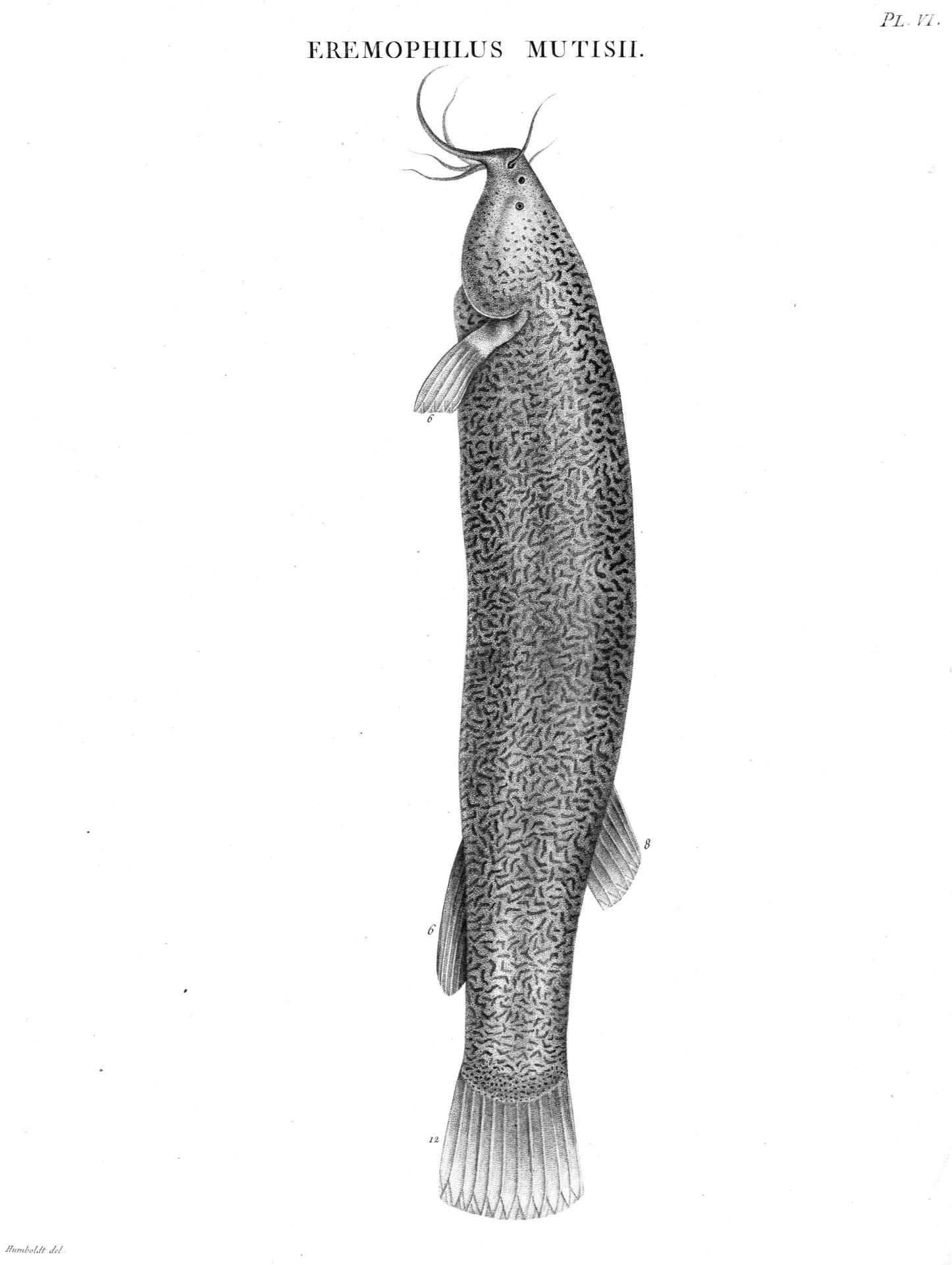 Eremophilus mutisii Humboldt.